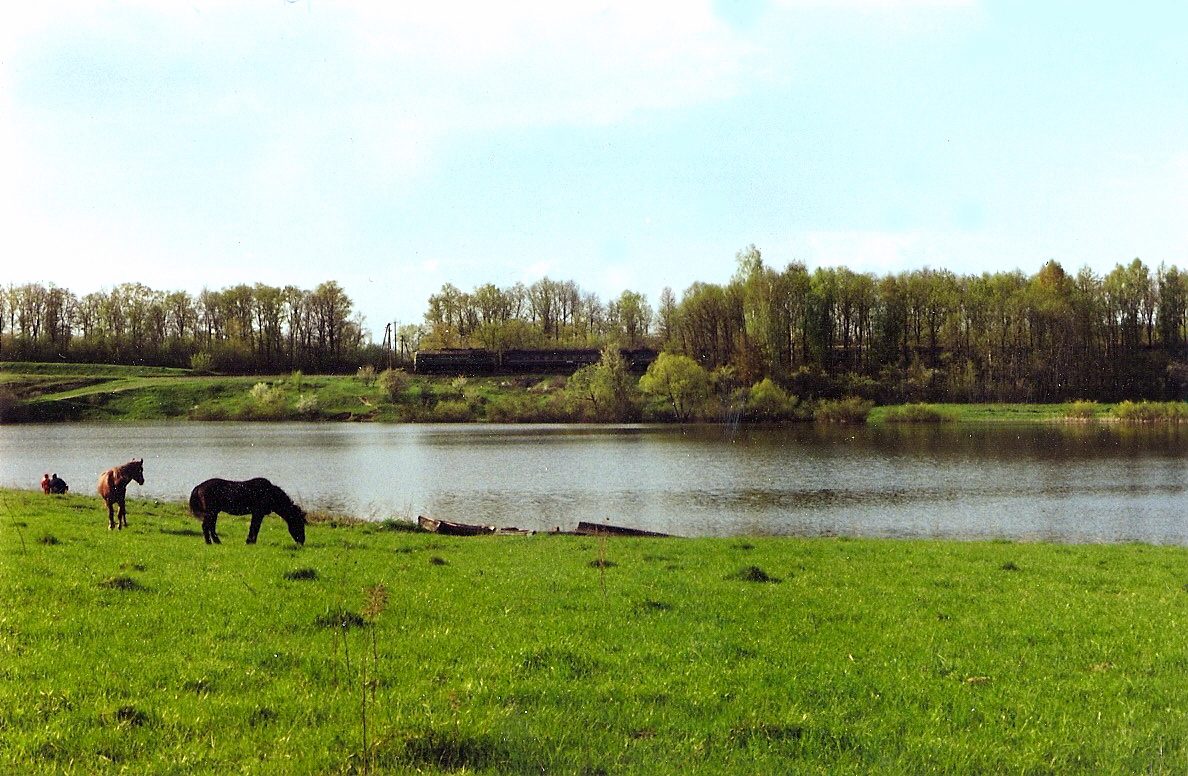 Воєнний став біля лісу Облоги коло Заслава. Поїзд Шепетівка - Івано-Франківськ